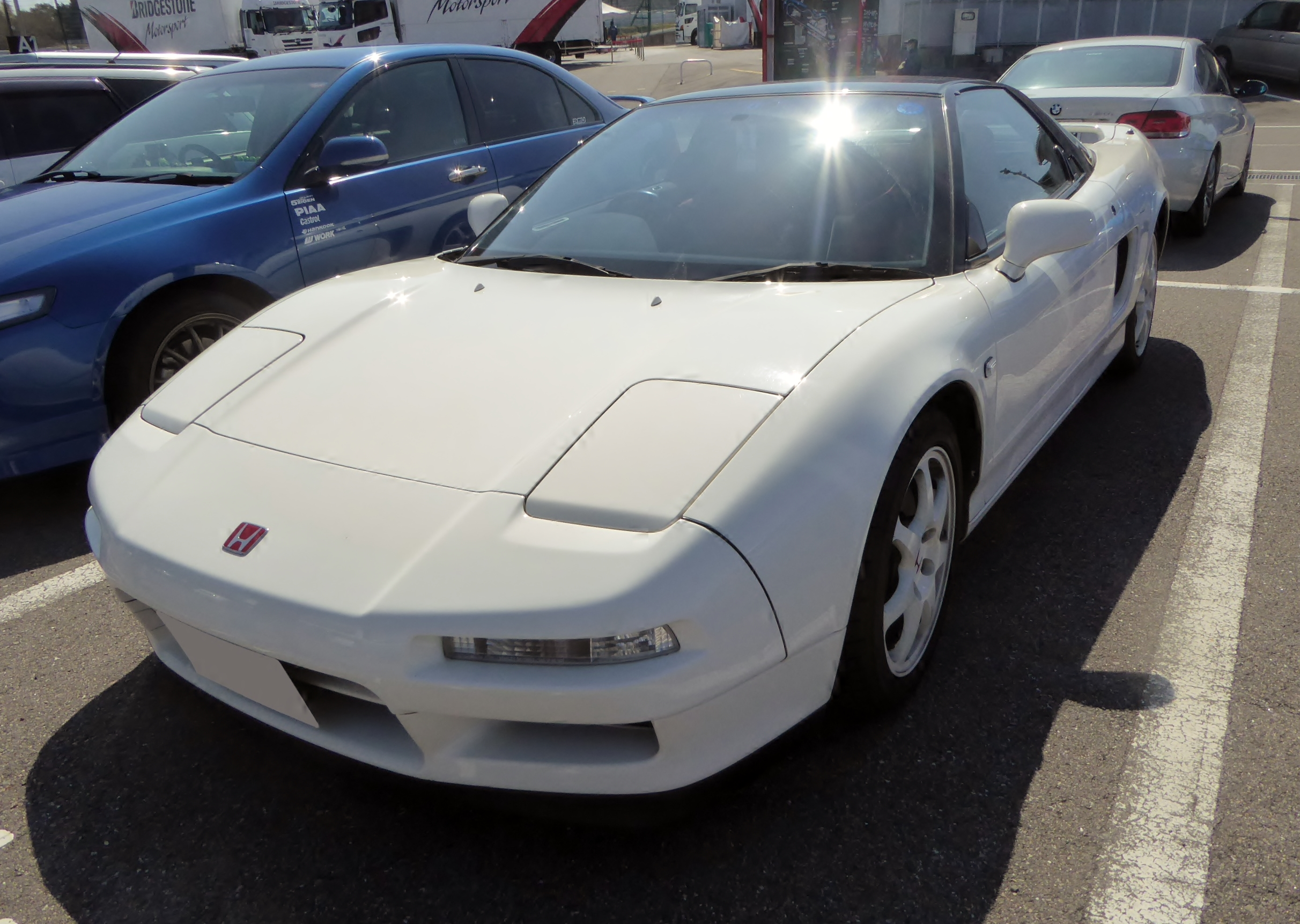 NA1型ホンダ・NSXタイプRをフロントから撮影。